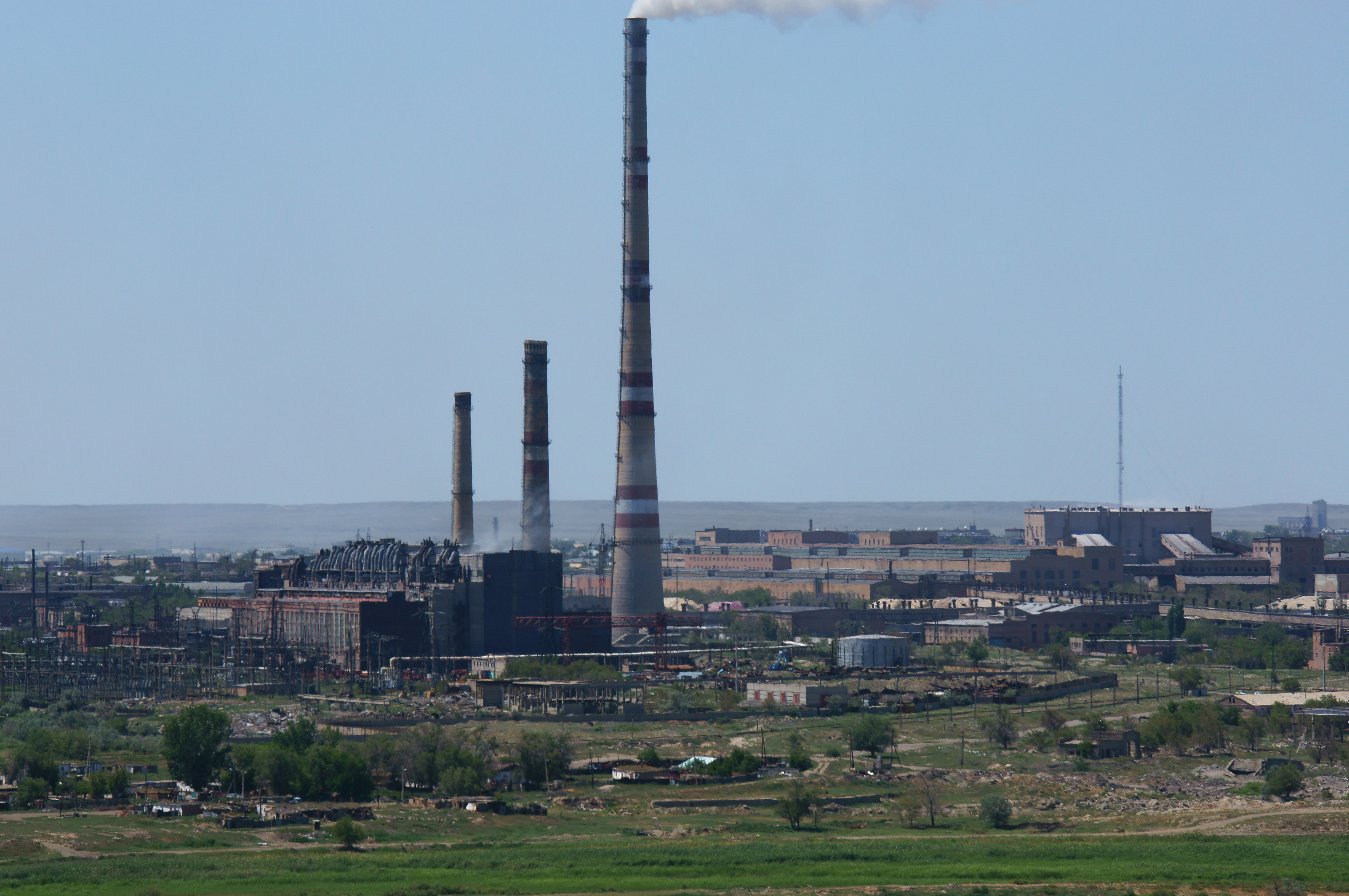 Жезказганская ТЭЦ